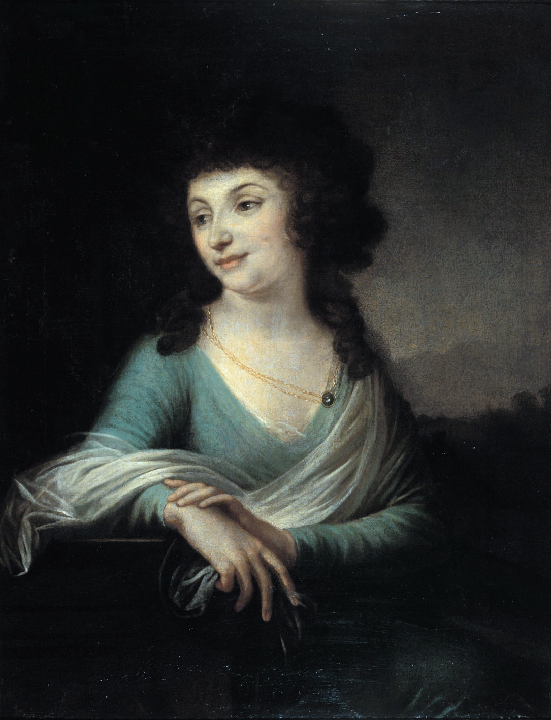 Franciška Sołtan (Radzivił)